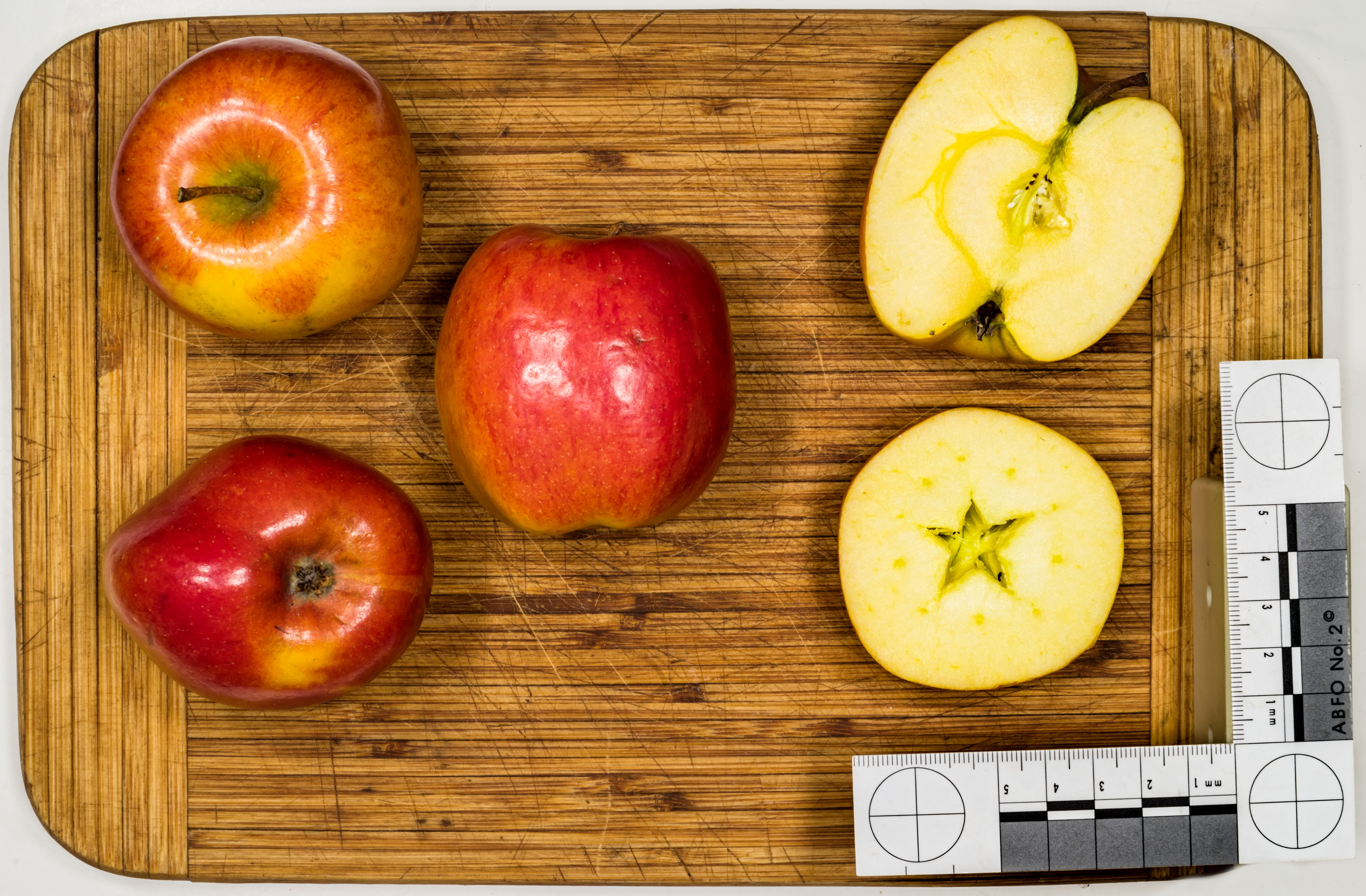 Apfelsorten